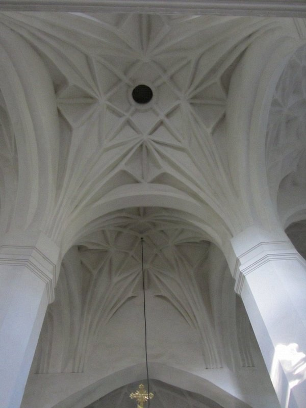 Царква ў Мураванцы. Гатычныя скляпенні